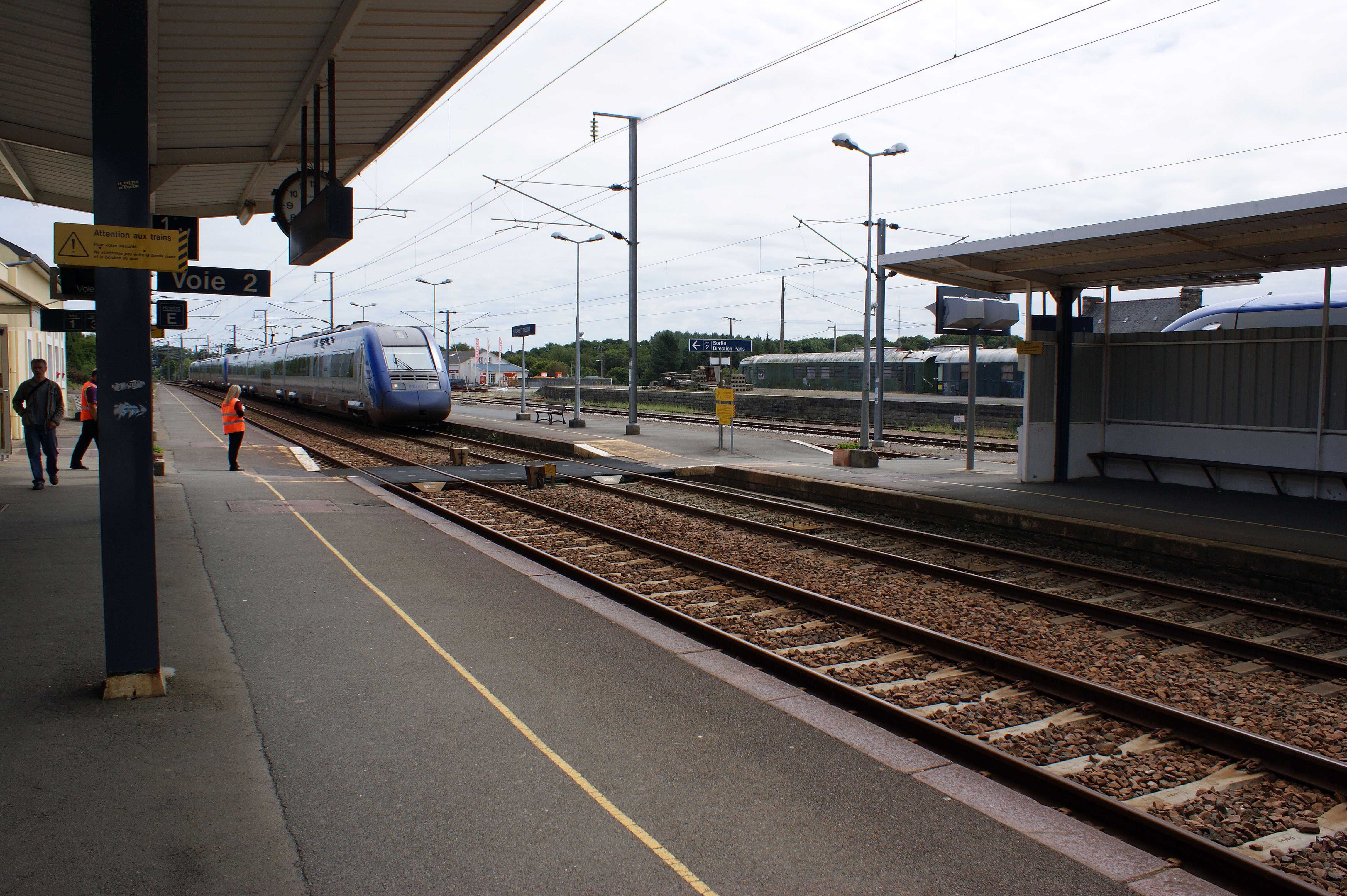 Gare de Plouaret-Trégor, arrivée d'une double rame Z 21541/542 & 21545-546.